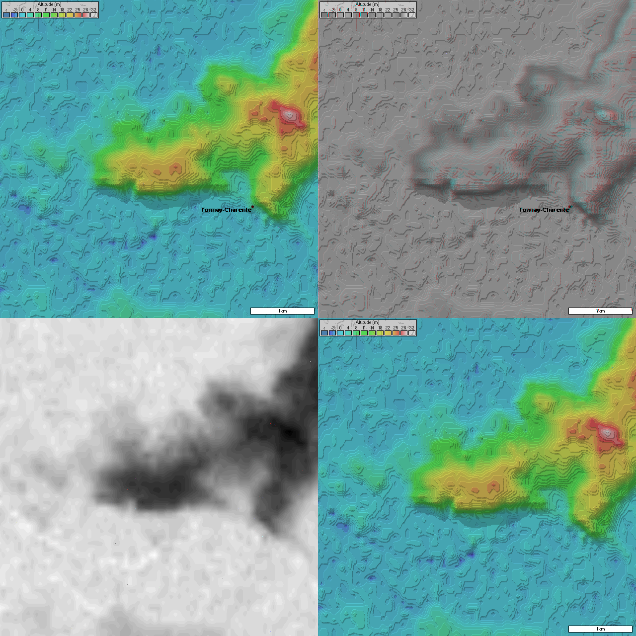 4 images topographique (5 km de coté) de Tonnay-Charente prisent par la mission SRTM. Image topographique + position des villes image topographique en relief + position des villes image topographique en niveau de gris (utile pour displacement map dans les logiciel 3D) Image topographique sans les villes Générée par le logiciel Radiomobile à partir des données domaine public de la mission SRTM de la NASA.